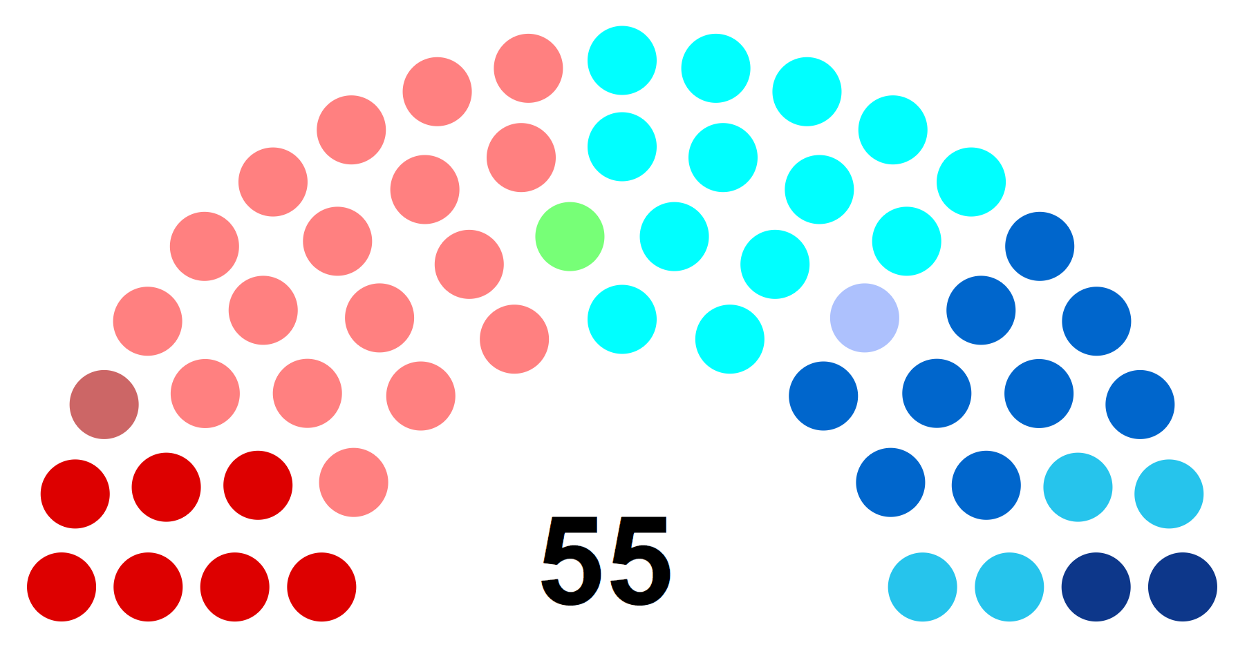 Partis politiques représentés au Conseil régional de Picardie en 1991